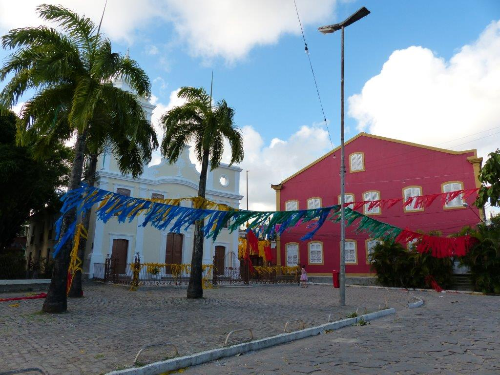 Bairro Poço da Panela, Recife, Brasil.